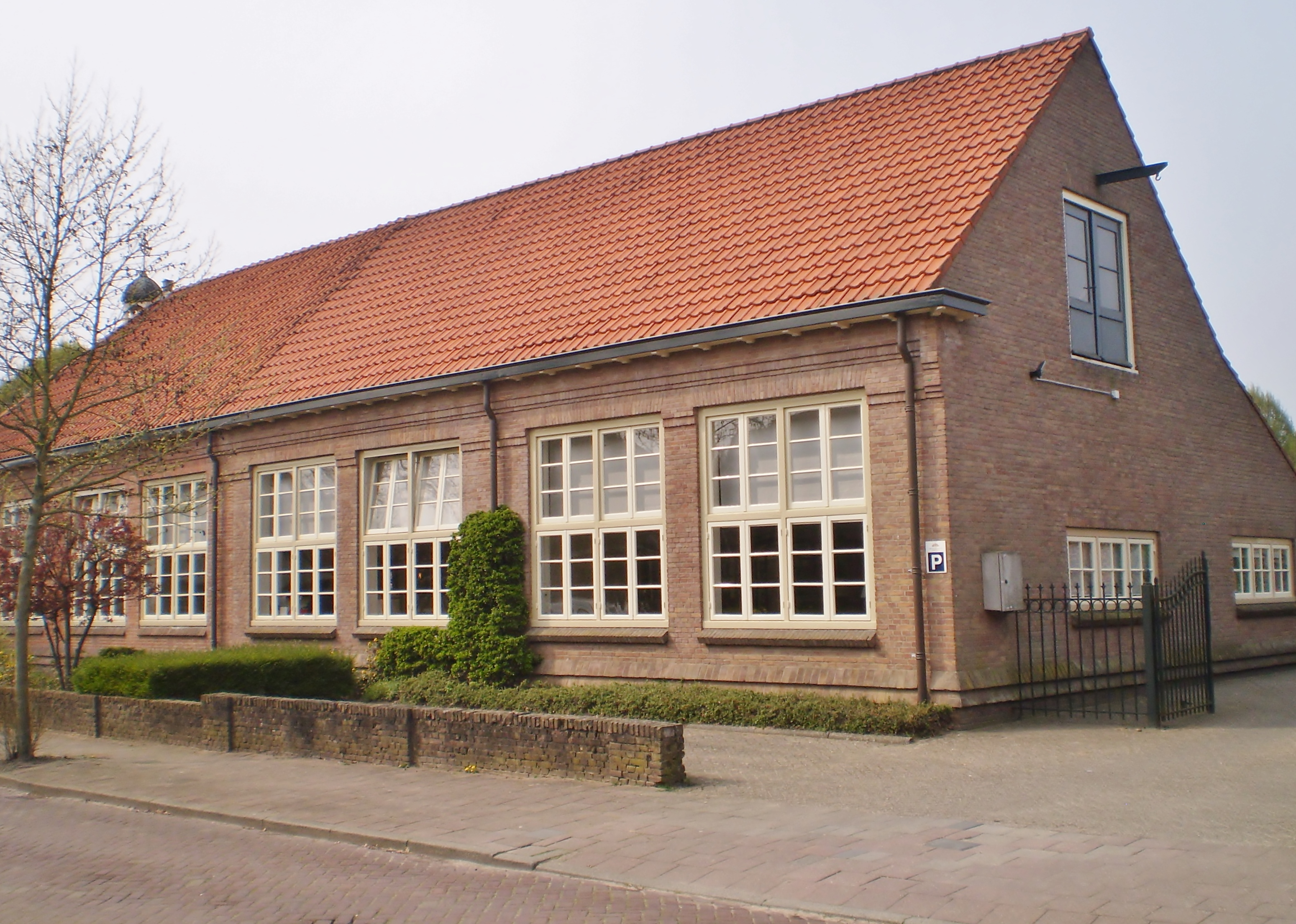 Zijgevel Mariaschool